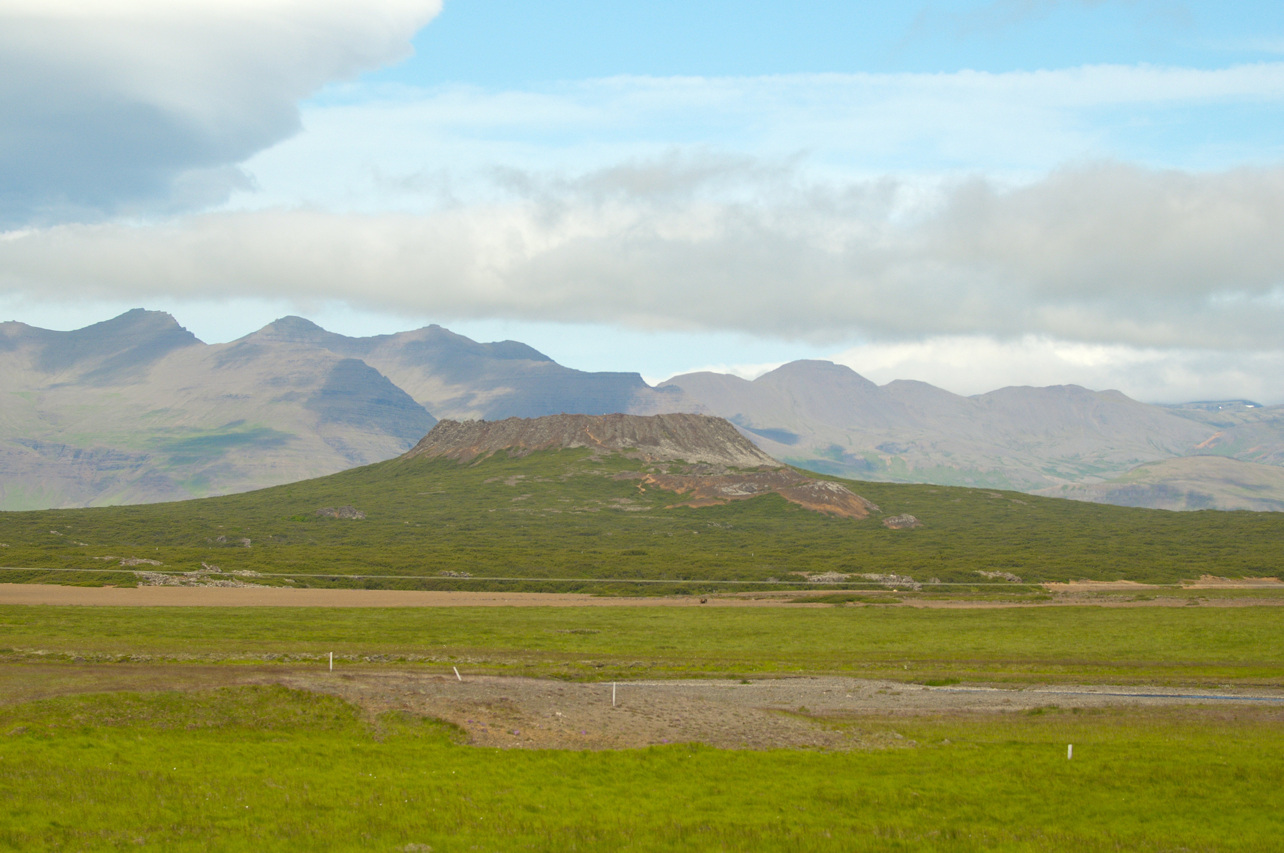 Eldborg depuis le Sud